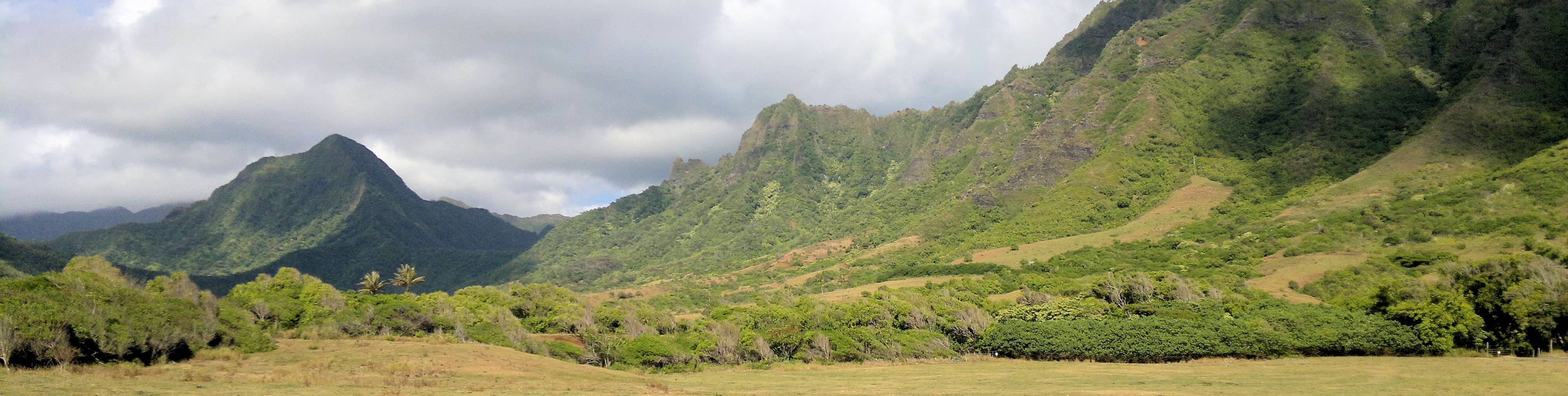 Das Tal von Kualoa auf der Insel Oahu.